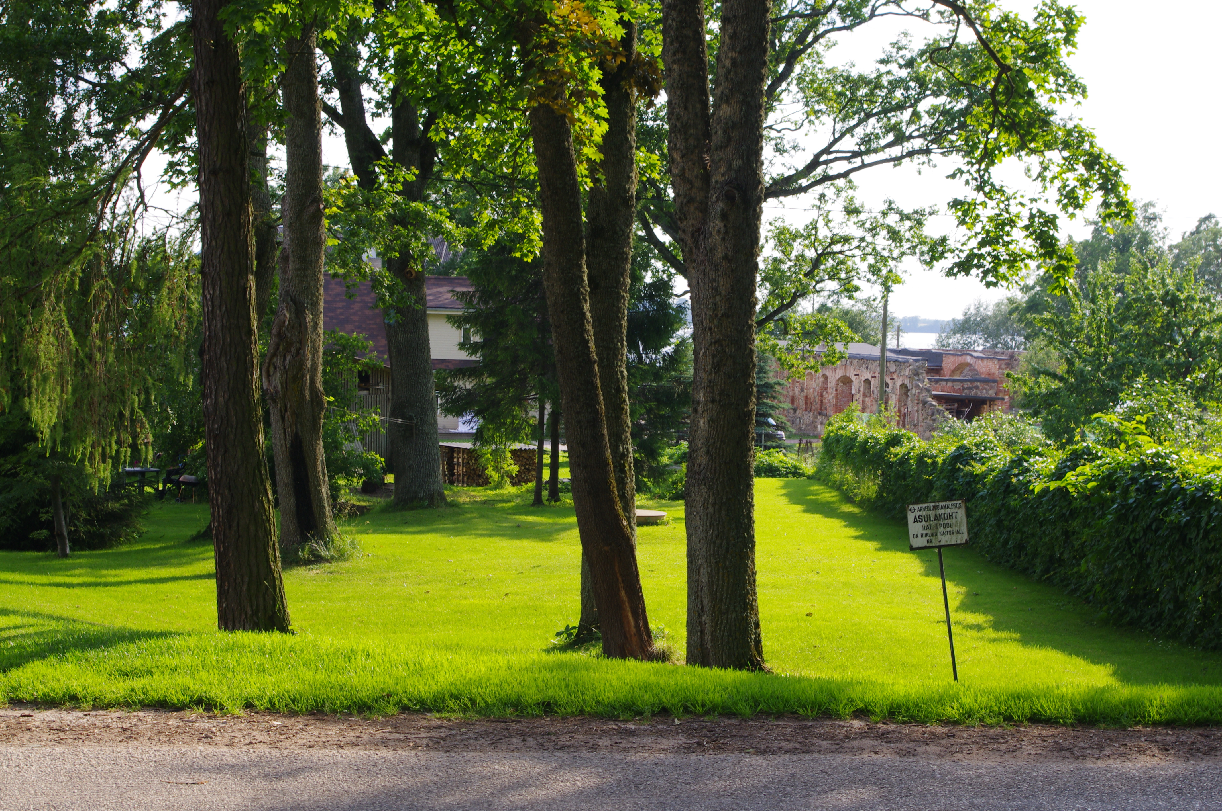 II aastatuhande I poole asulakoht hilisemas Saadjärve mõisasüdames